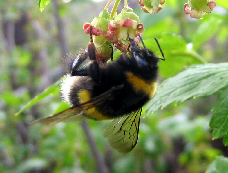 bumblebee